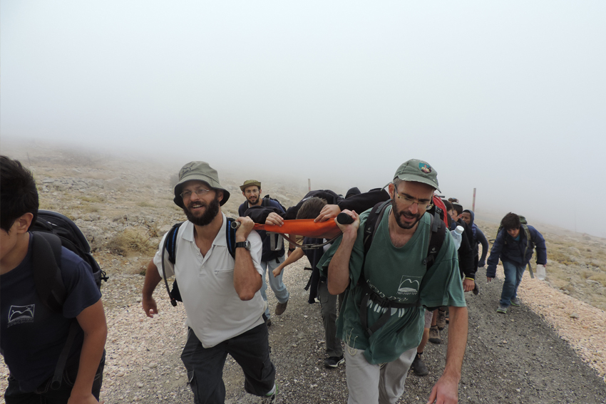 משמאל ראש הישיבה הרב מוטי ומימין הרב אלדד